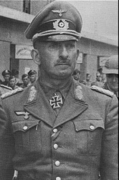 Il generale tedesco Hans-Jurgen von Arnim, comandante delle forze dell'Asse in Tunisia